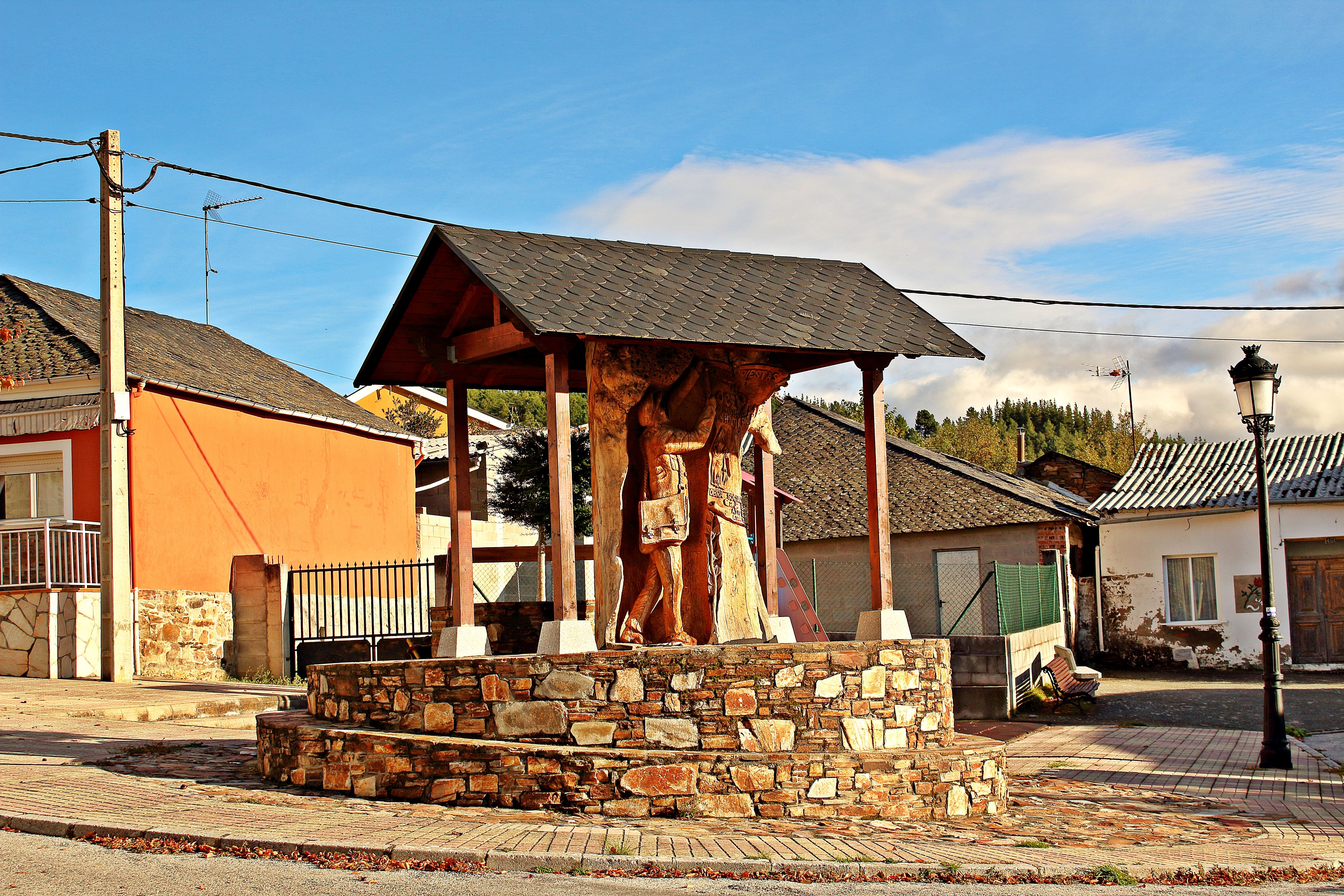 Ocero, localidad de Sancedo, comarca de El Bierzo, provincia de León.